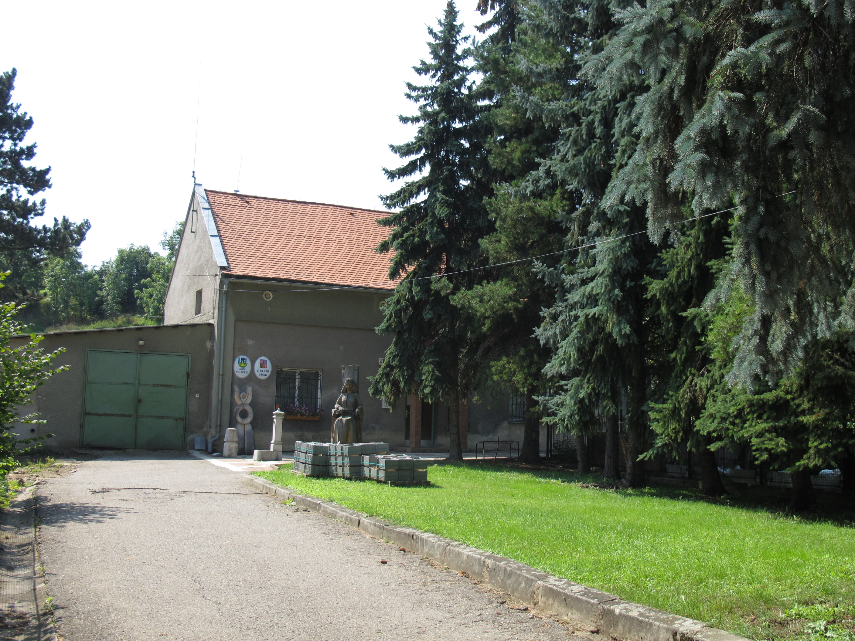 Obec Polerady - obecní úřad